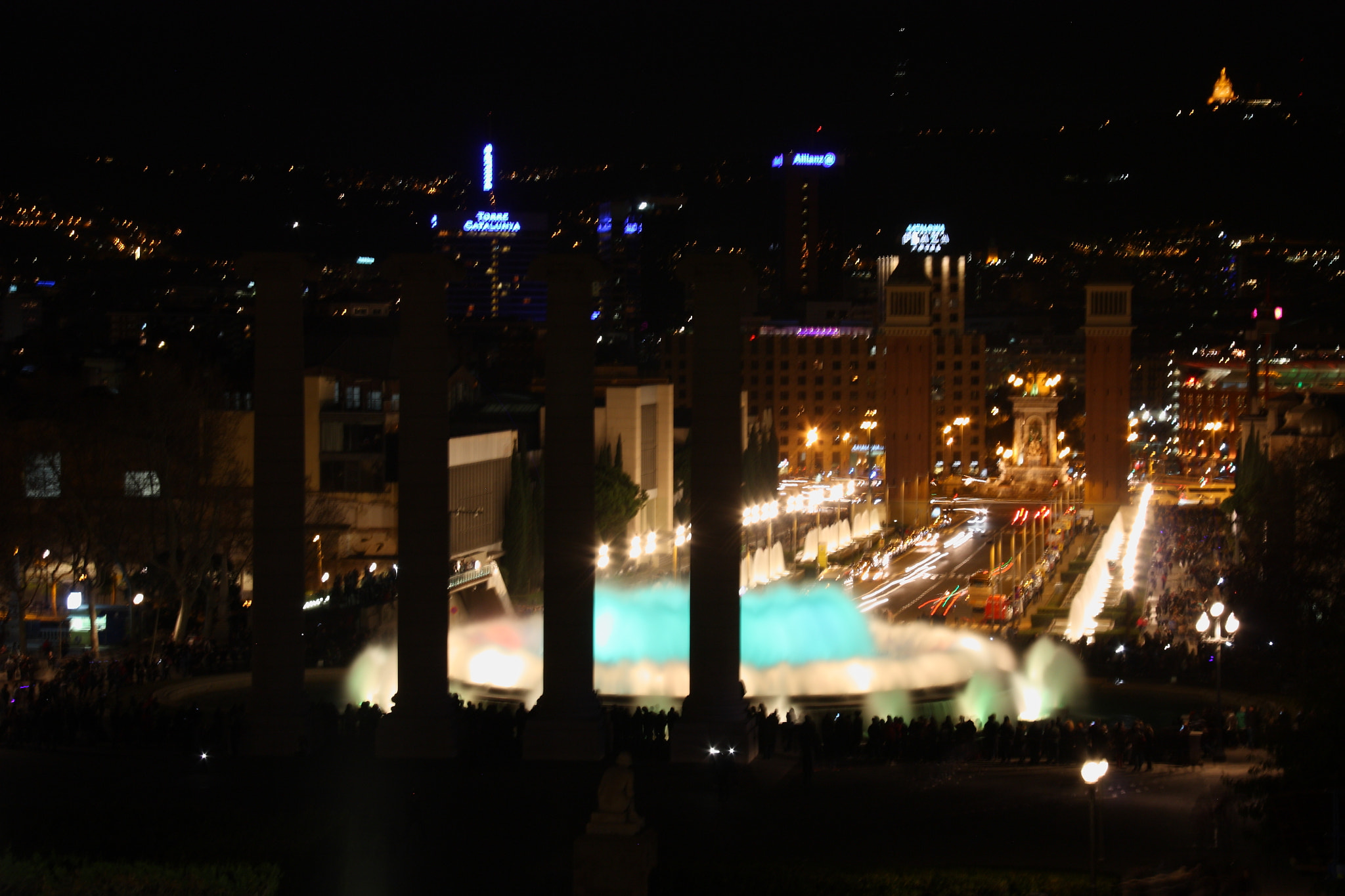 500px provided description: One night in Montjuic - Magic Fountain - Barcelona - Una noche en Montjuic - Fuente Magica - Barcelona [#water ,#travel ,#lights ,#moon ,#catalonia ,#fountain ,#spain ,#barcelona ,#montjuic ,#font magica ,#Magic Fountain ,#cataluna/catalunya]